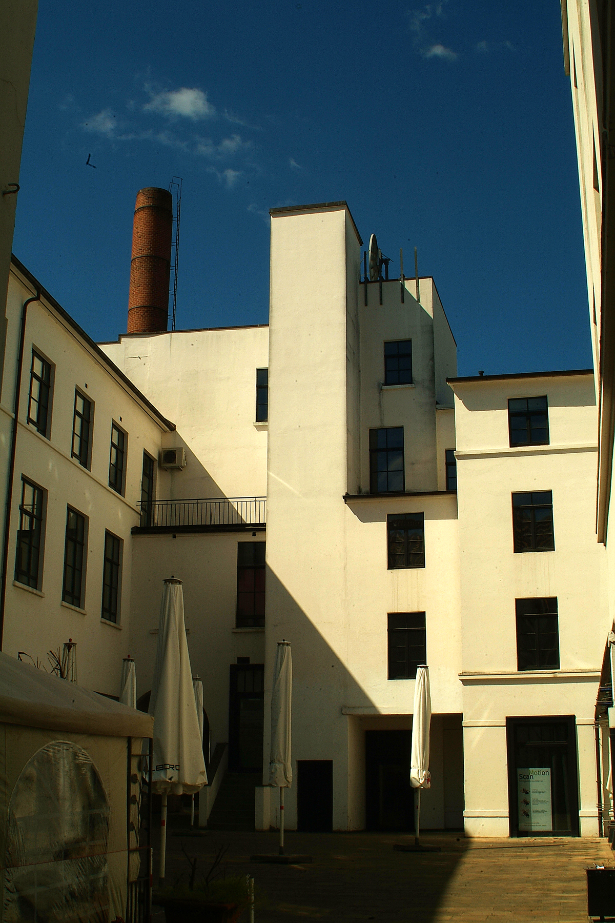 Sie haben ein aussagekräftigeres, besseres, ergänzendes Bild? Sogar ein historisches Dokument zur Bildungsförderung? Zeigen Sie' s uns. Stiften Sie es - Ihren Kindern, unseren Enkeln, allen Menschen.